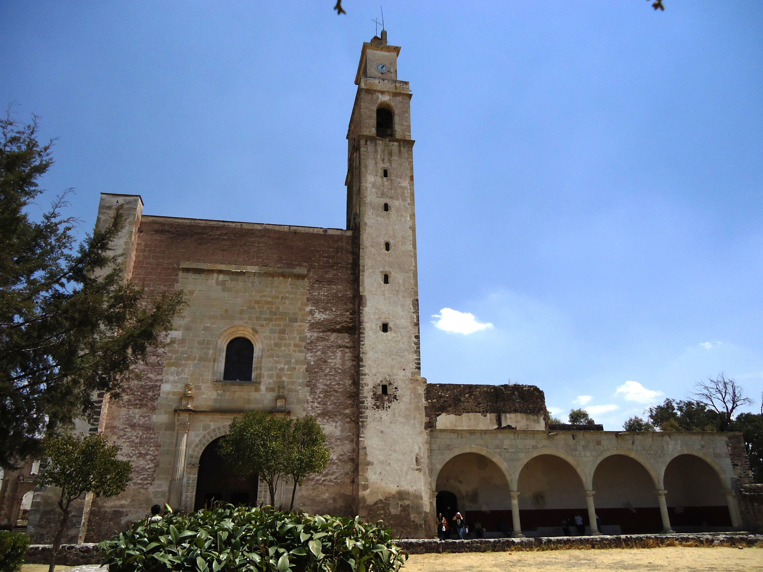 emplo y antiguo convento de Todos los Santos en Zempoala, Hidalgo